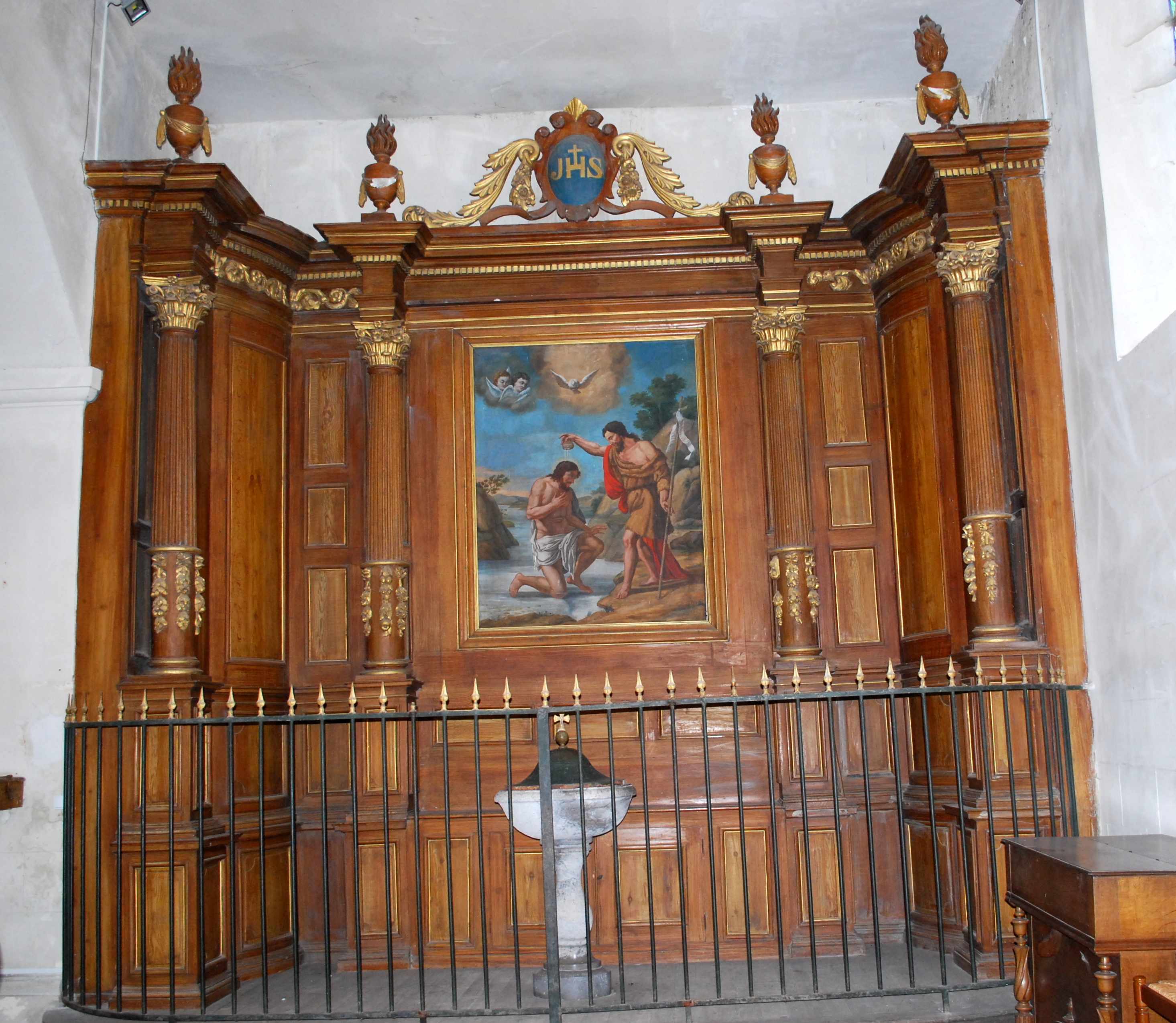 Saint-Morillon, église Saint-Maurille